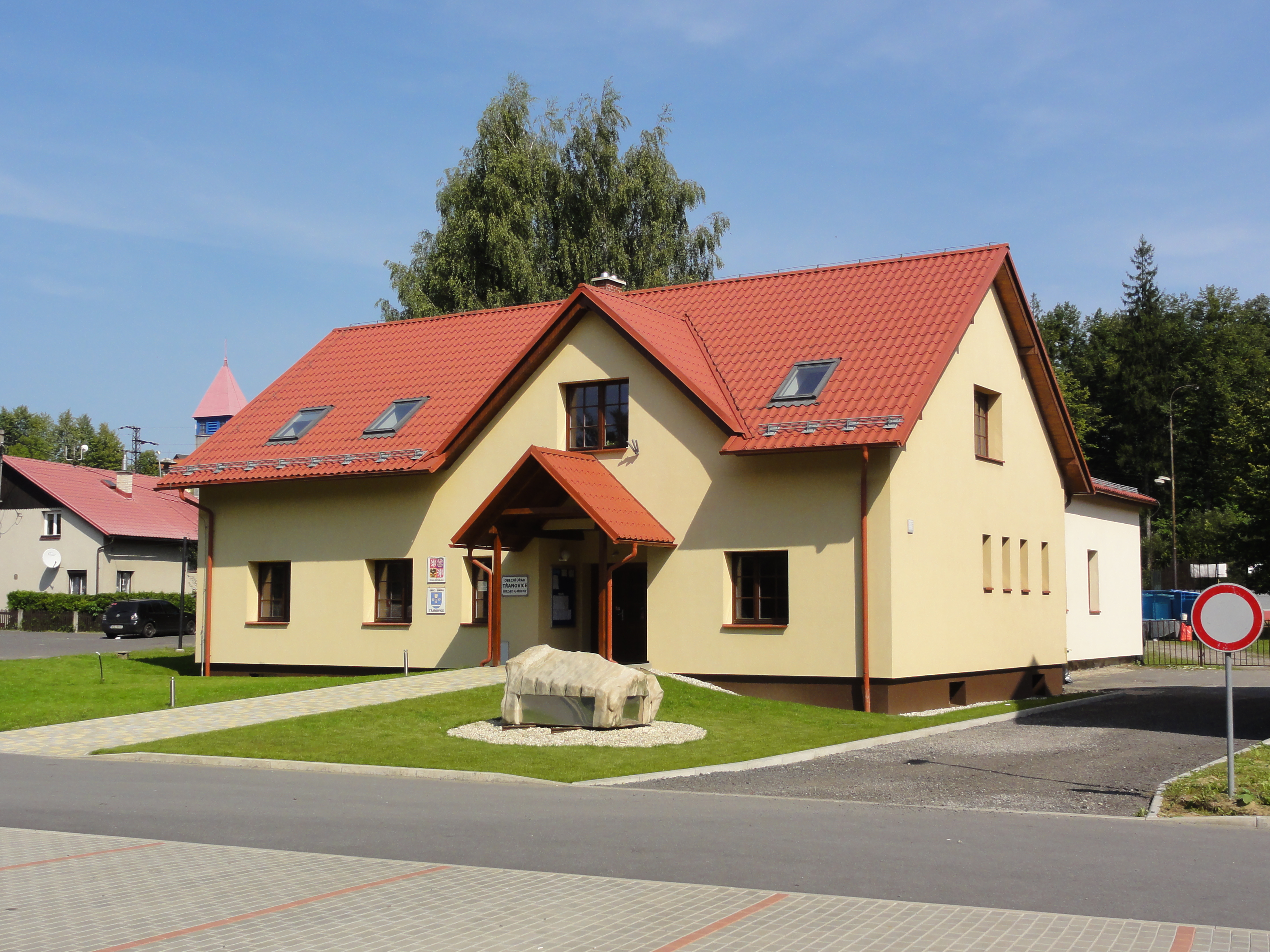 Urząd gminy w Trzanowicach